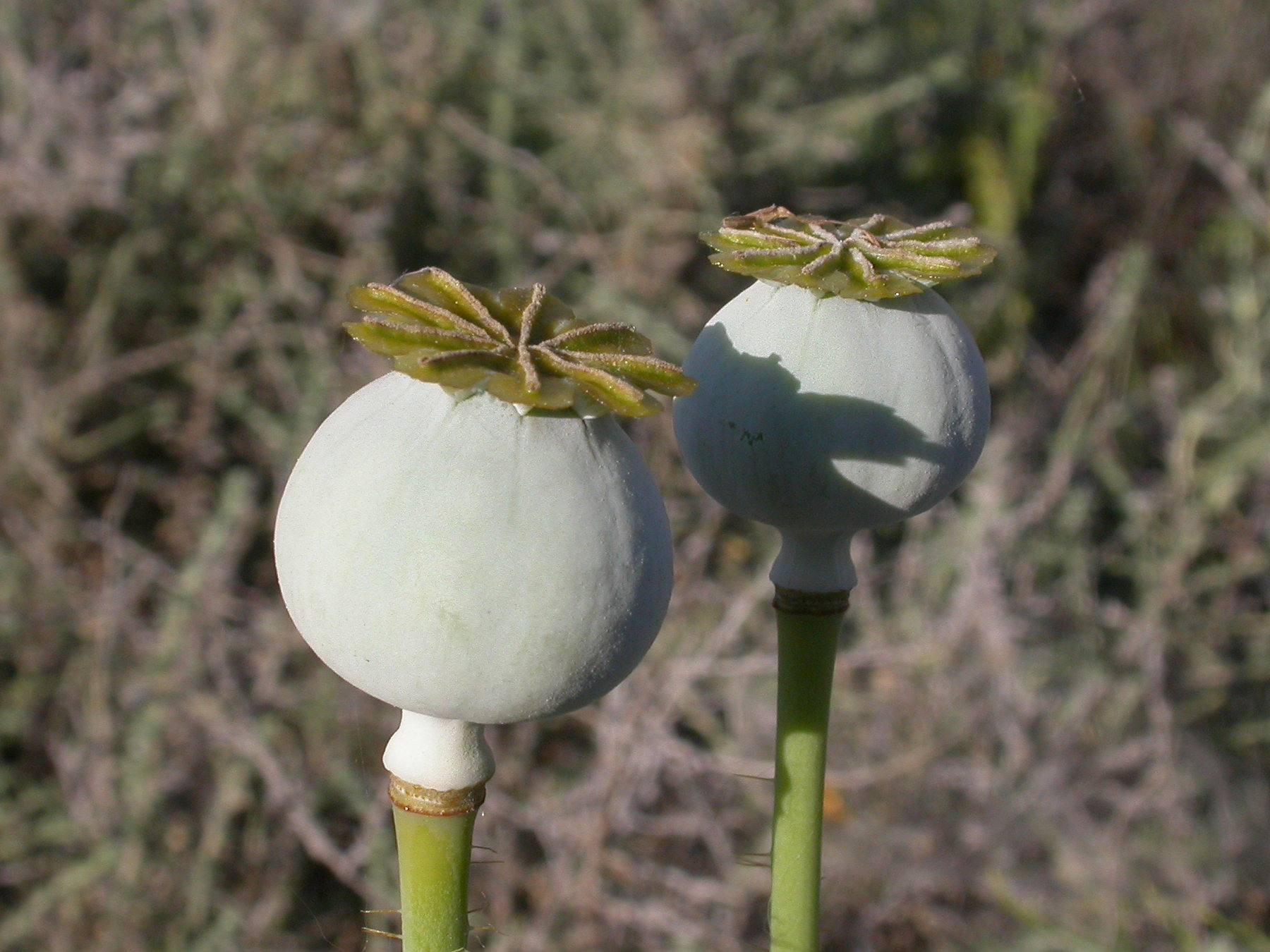 Papaver somniferum (Papaveraceae). Rivas Vaciamadrid, Madrid, España.